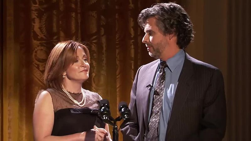 Michael Chabon & Ayelet Waldman Speak at the White House Poetry Jam- (4 of 8).webm